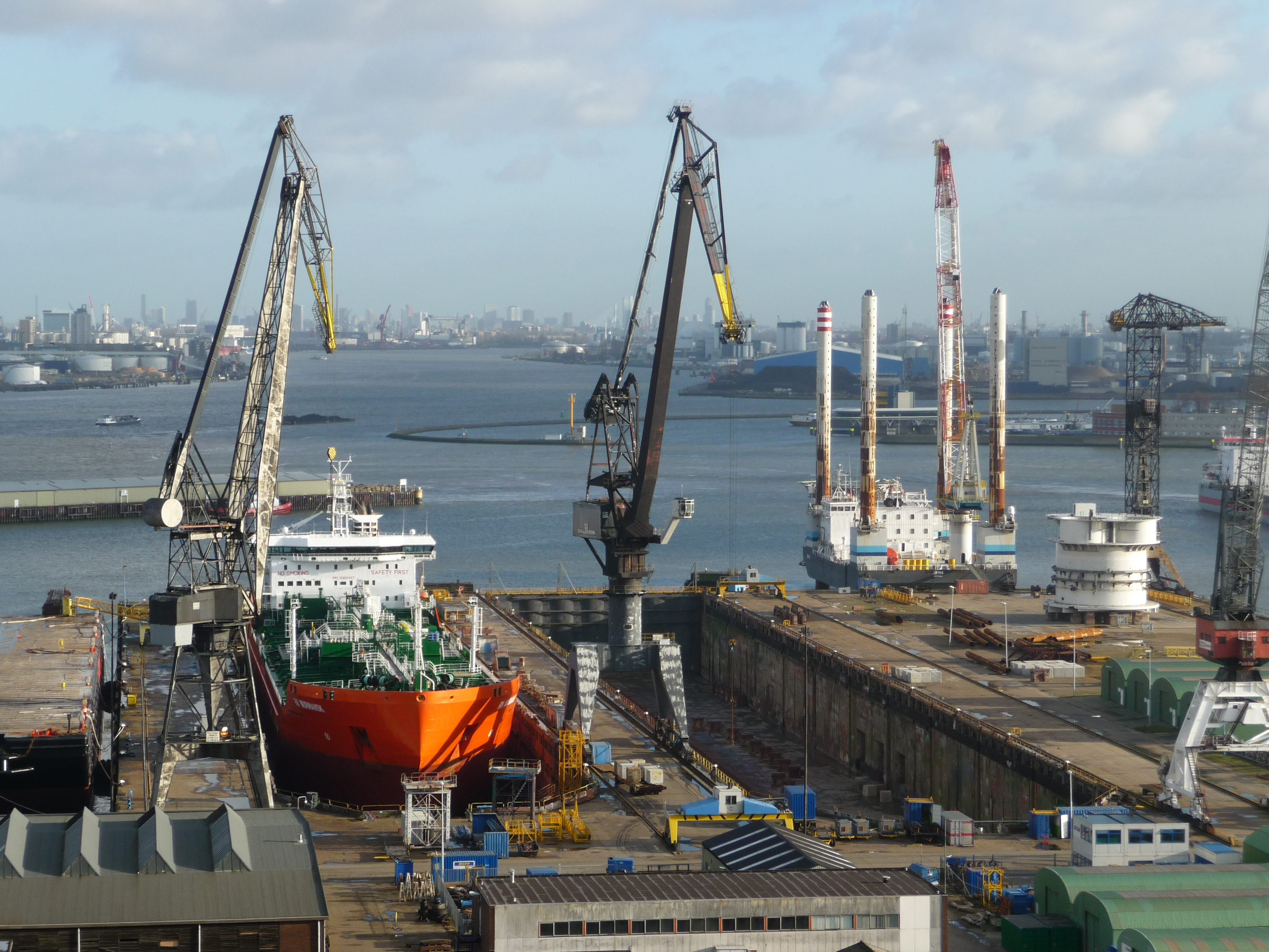 Keppel Verolme dok 5 & 6. Tanker RN Murmansk in dok 5